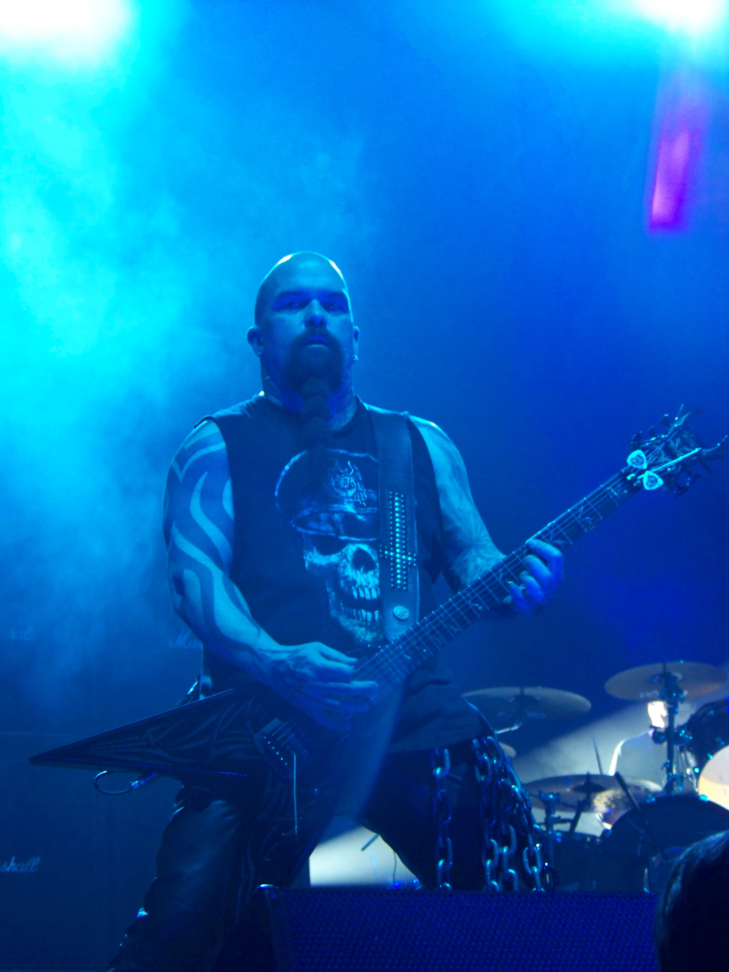 Фото Керри Кинга из Slayer. Март 2011, Киев, концерт Slayer и Megadeth.